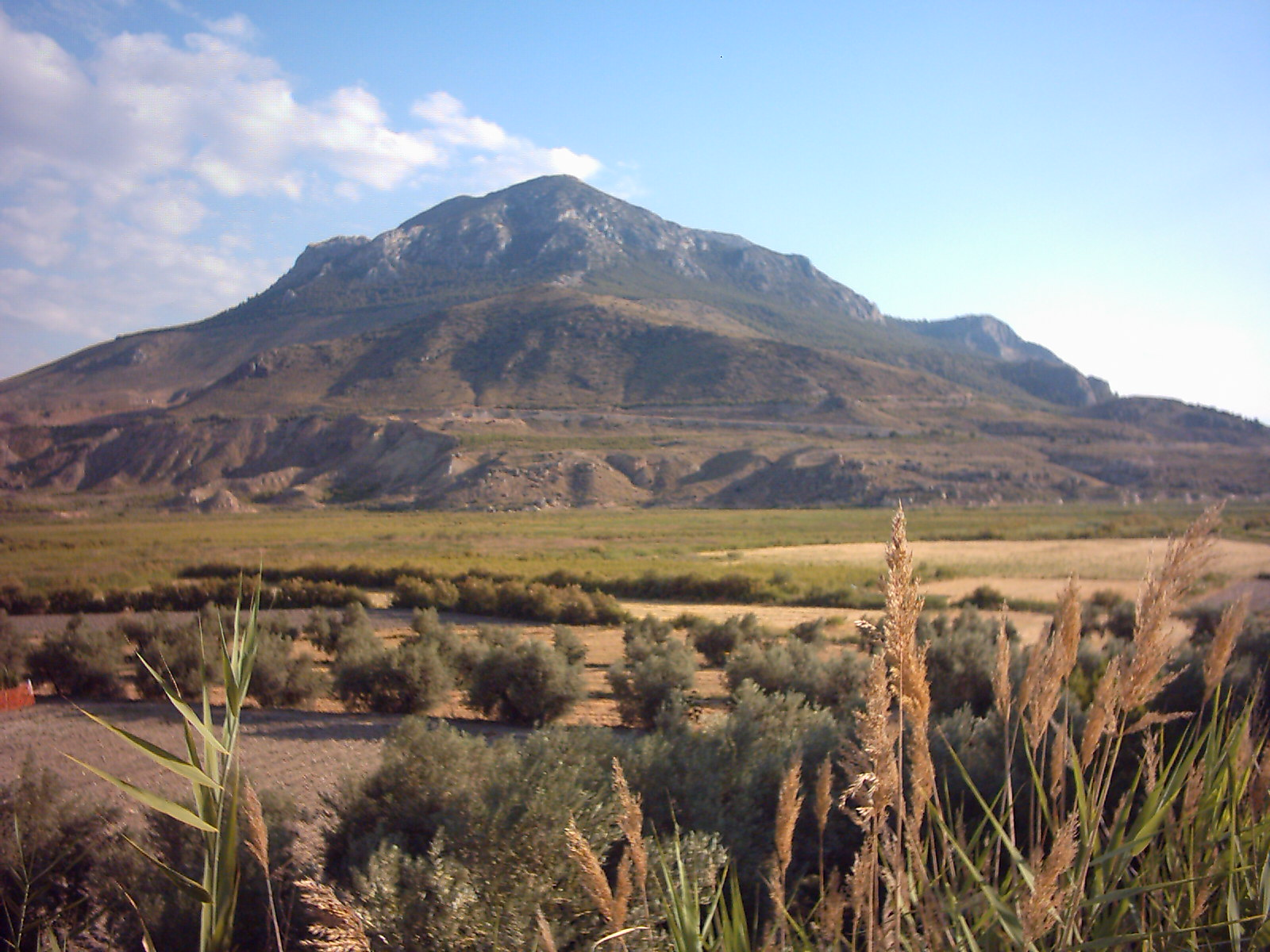 Cerro Jabalcón, situado en la Hoya de Baza, provincia de Granada (España). Imagen tomada desde la pedanía de Los Términos, en el término municipal de Baza.